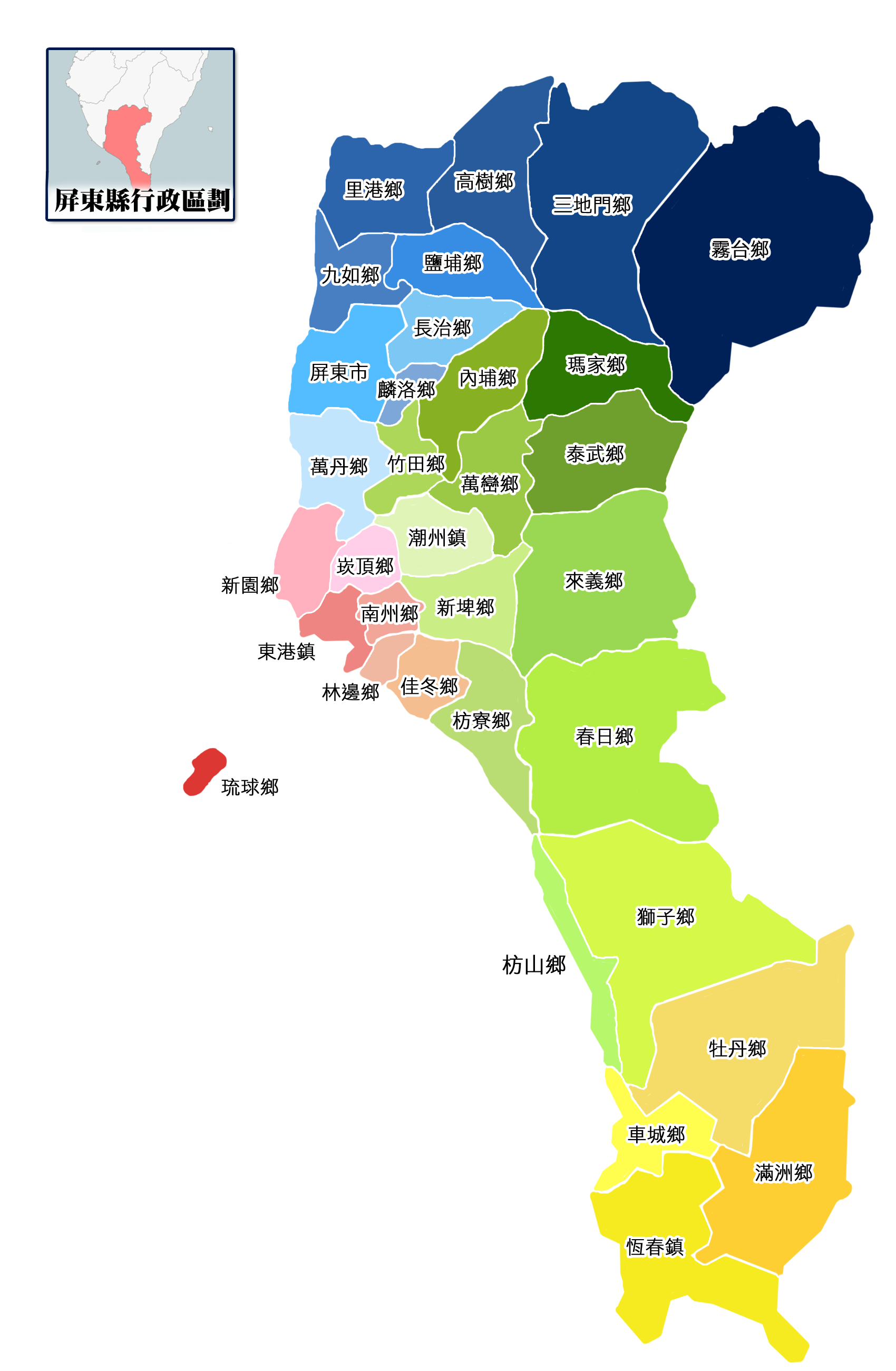 中文（台灣）: 臺灣省屏東縣行政區劃。